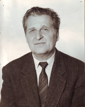 Jaroslav Podolák, ředitel Gymnázia v Kadani v letech 1990 až 1996